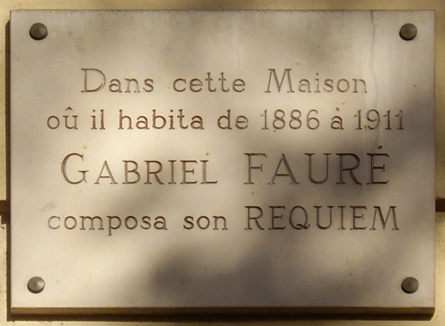 Plaque commémorative, 154 boulevard Malesherbes, Paris 17e. « Dans cette maison où il habita de 1886 à 1911, Gabriel Fauré composa son Requiem. »